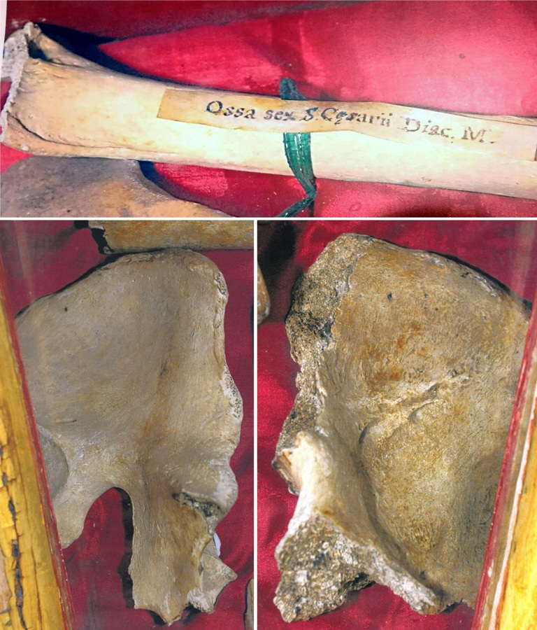 Ossa San Cesario diacono e martire, Basilica San Frediano Lucca